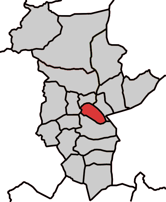 Situación da parroquia de Cabaneiro no concello de Abadín